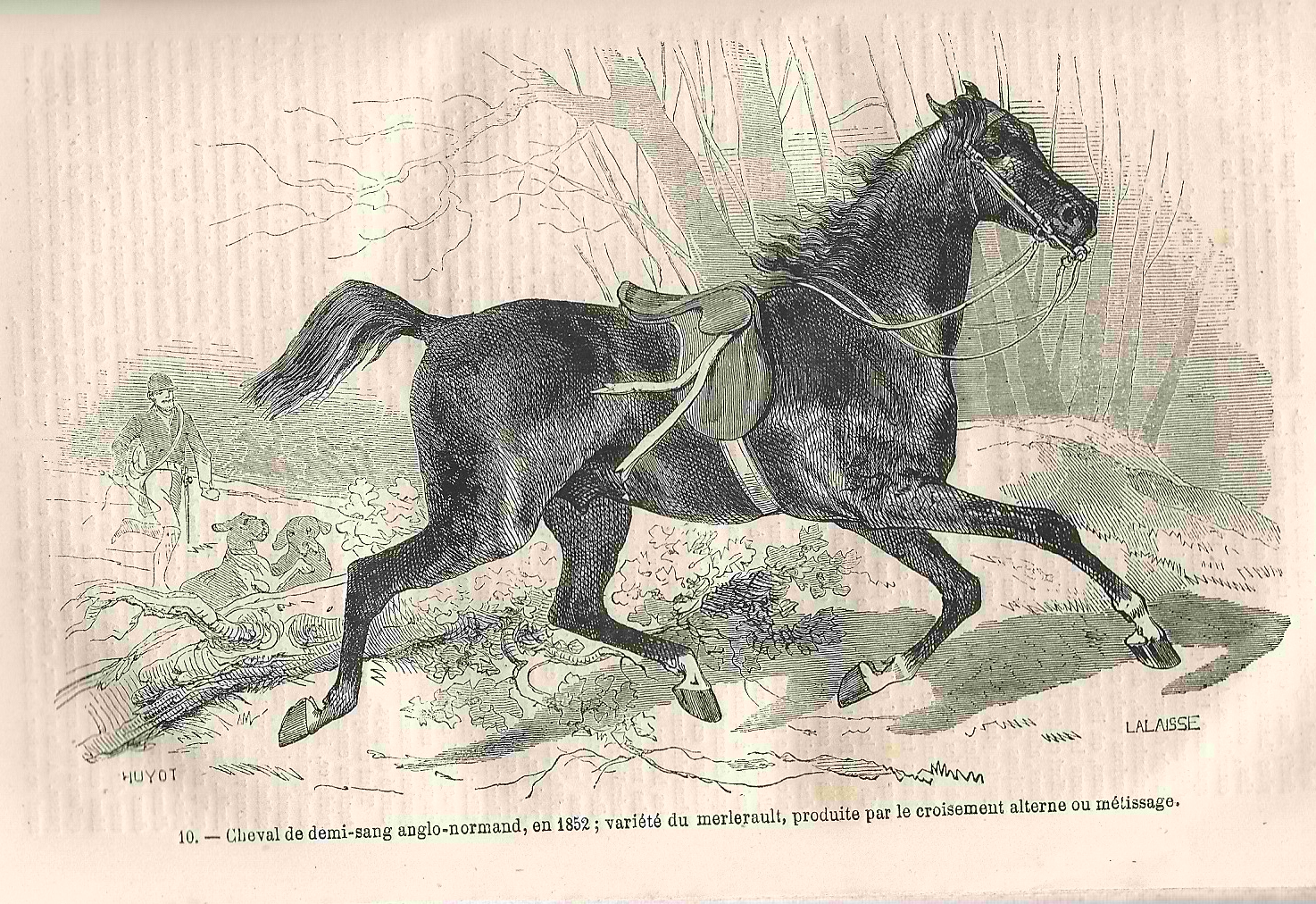 Cheval demi-sang anglo-normand (1852)